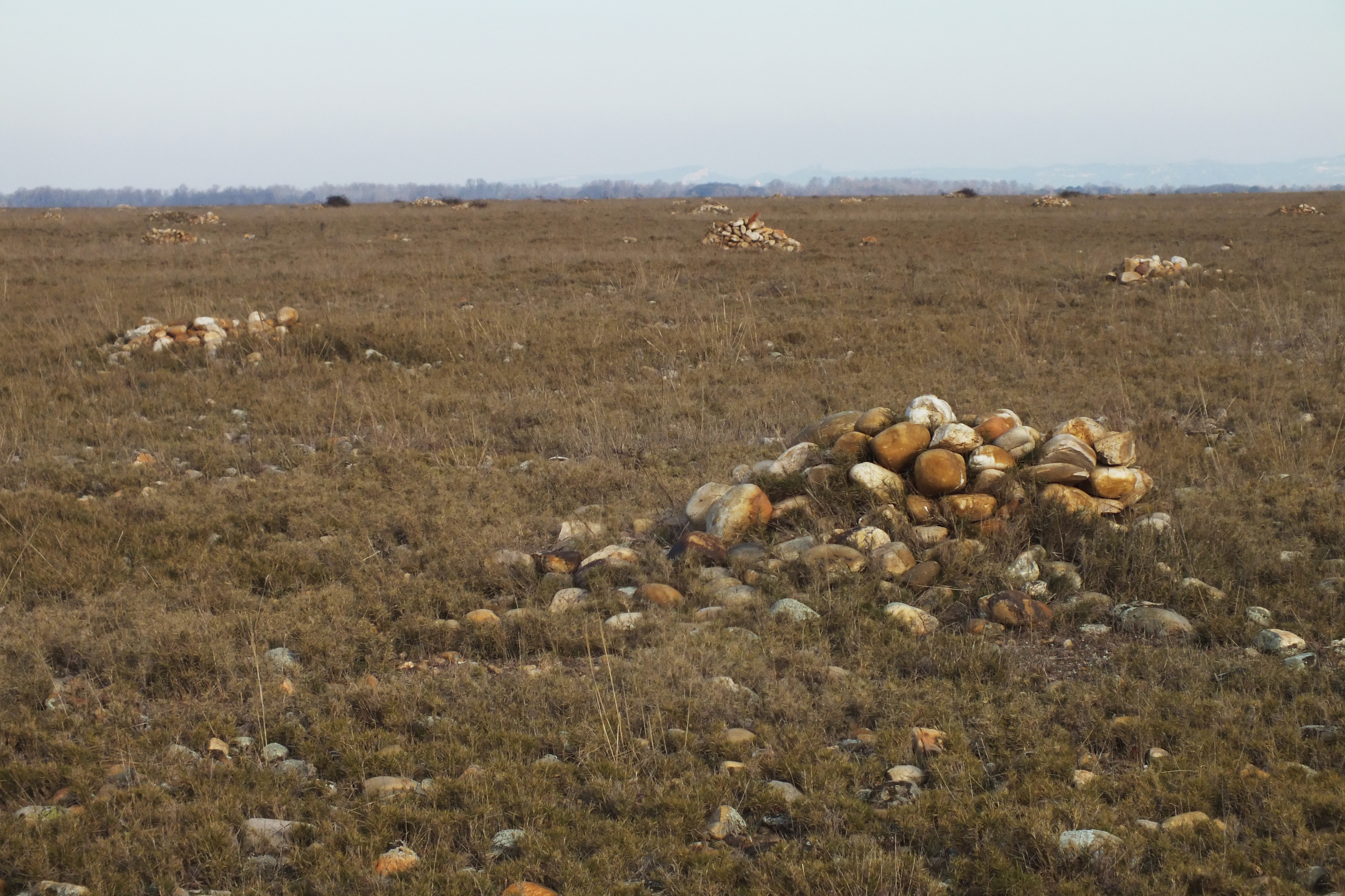 Tas de galets construits pendant la Deuxième Guerre Mondiale pour l'armée allemande, craignant un débarquement aérien allié dans la Plaine de la Crau. Secteur du Grand Carton.